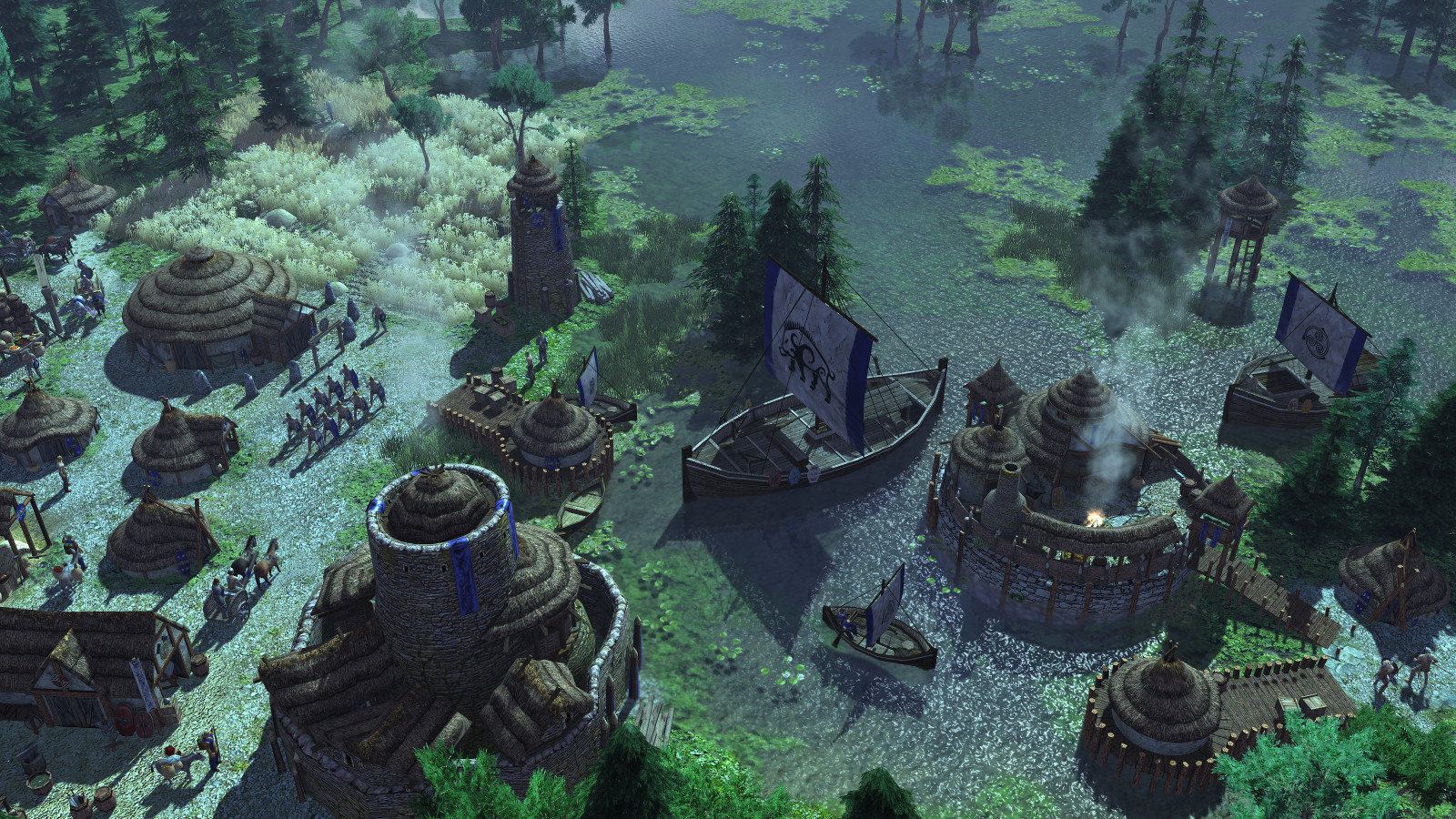 Брити висаджуються на берег